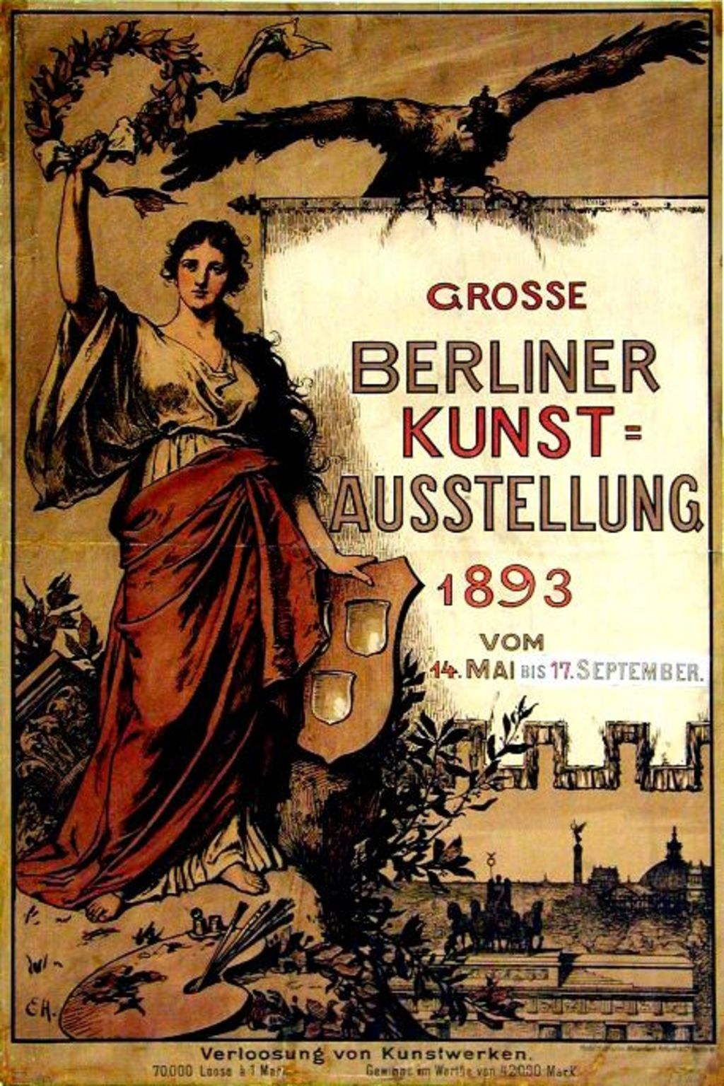 Werbeplakat